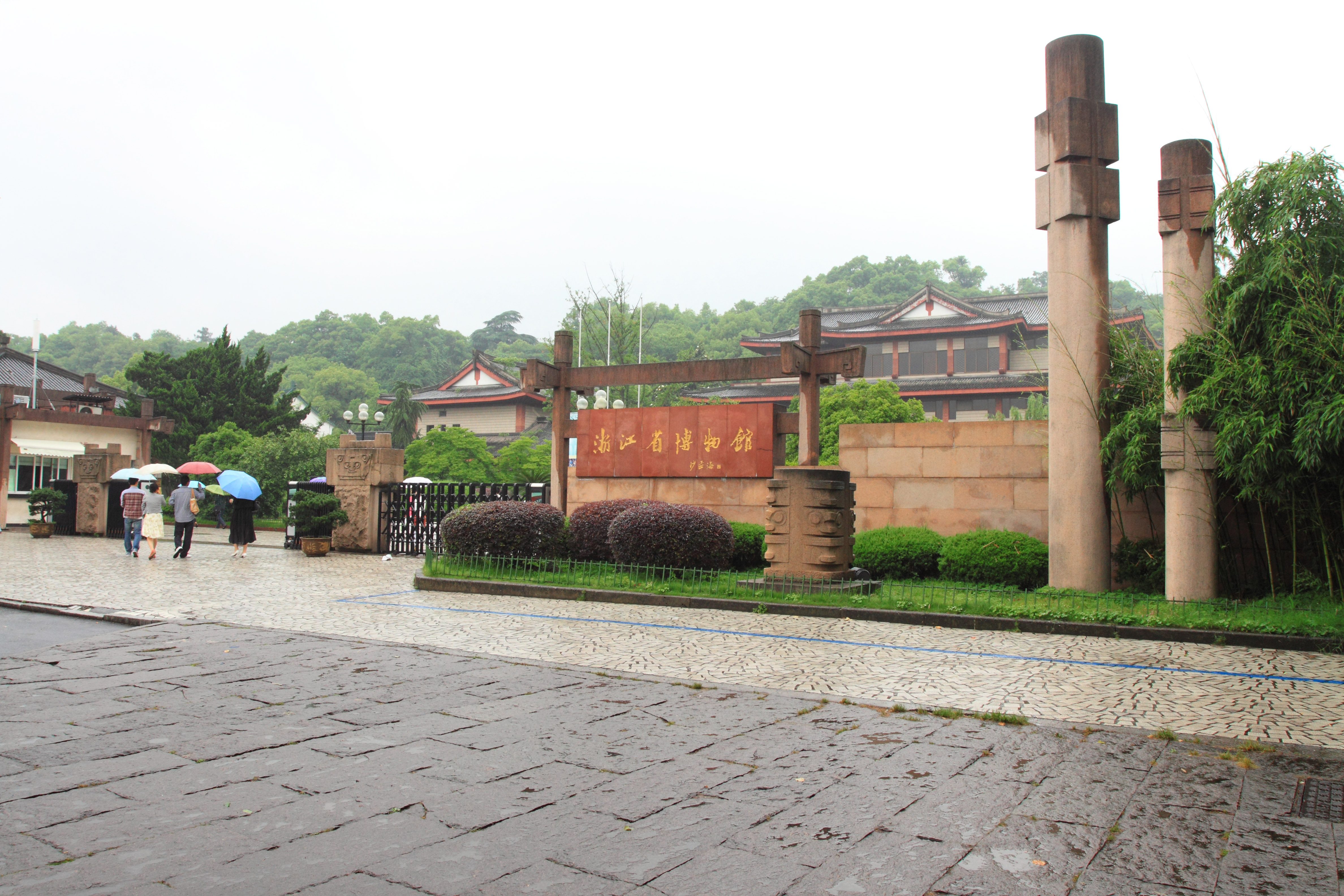 浙江省博物馆，位于中国浙江省杭州市。